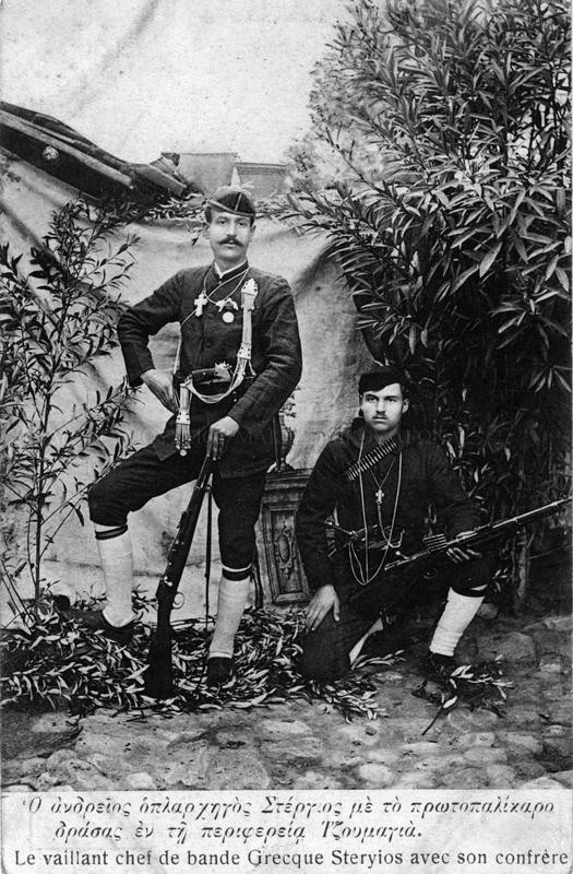 Гръцкия андартски капитан Стерьос Влахвеис със свой четник в село Леригово.